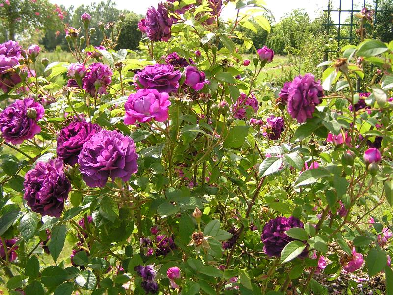 centifolia 'Tuscany superb'